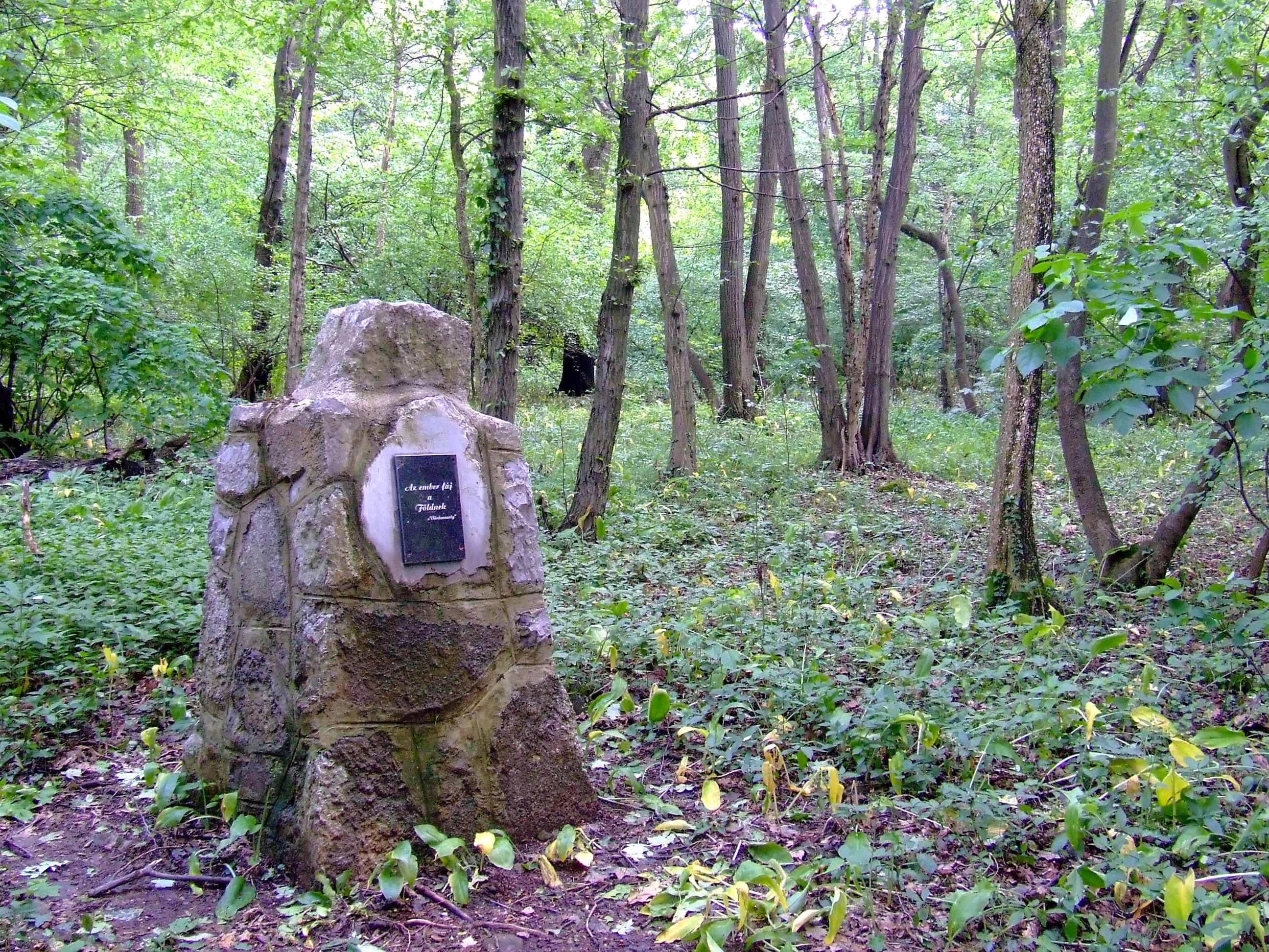 A Vadász-emlékmű a Rotary körsétány lapisi kanyarjában. Az idézet Vörösmarty Mihály Emberek című költeményéből való